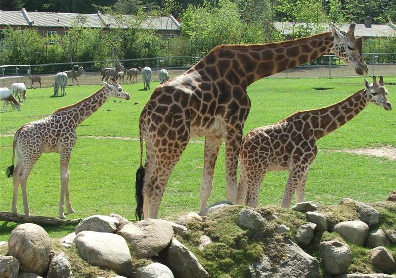 Giraf - Aalborg Zoo, Denmark